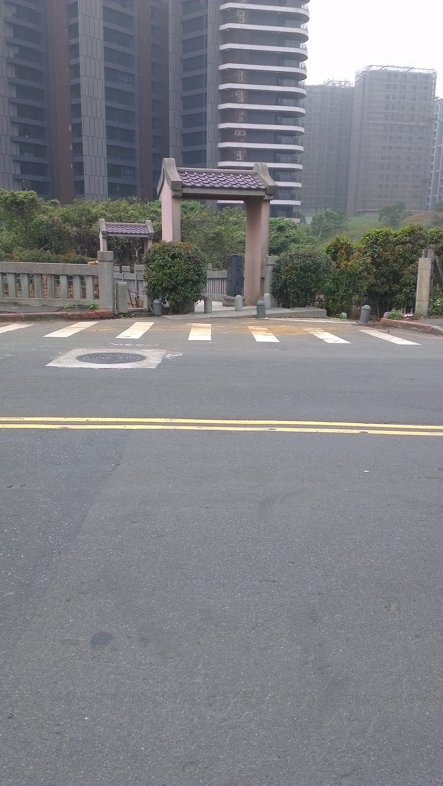 公司田溪橋